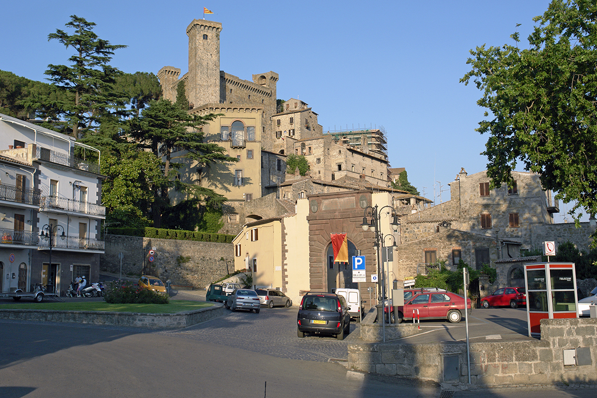 Bolsena, Stadttor